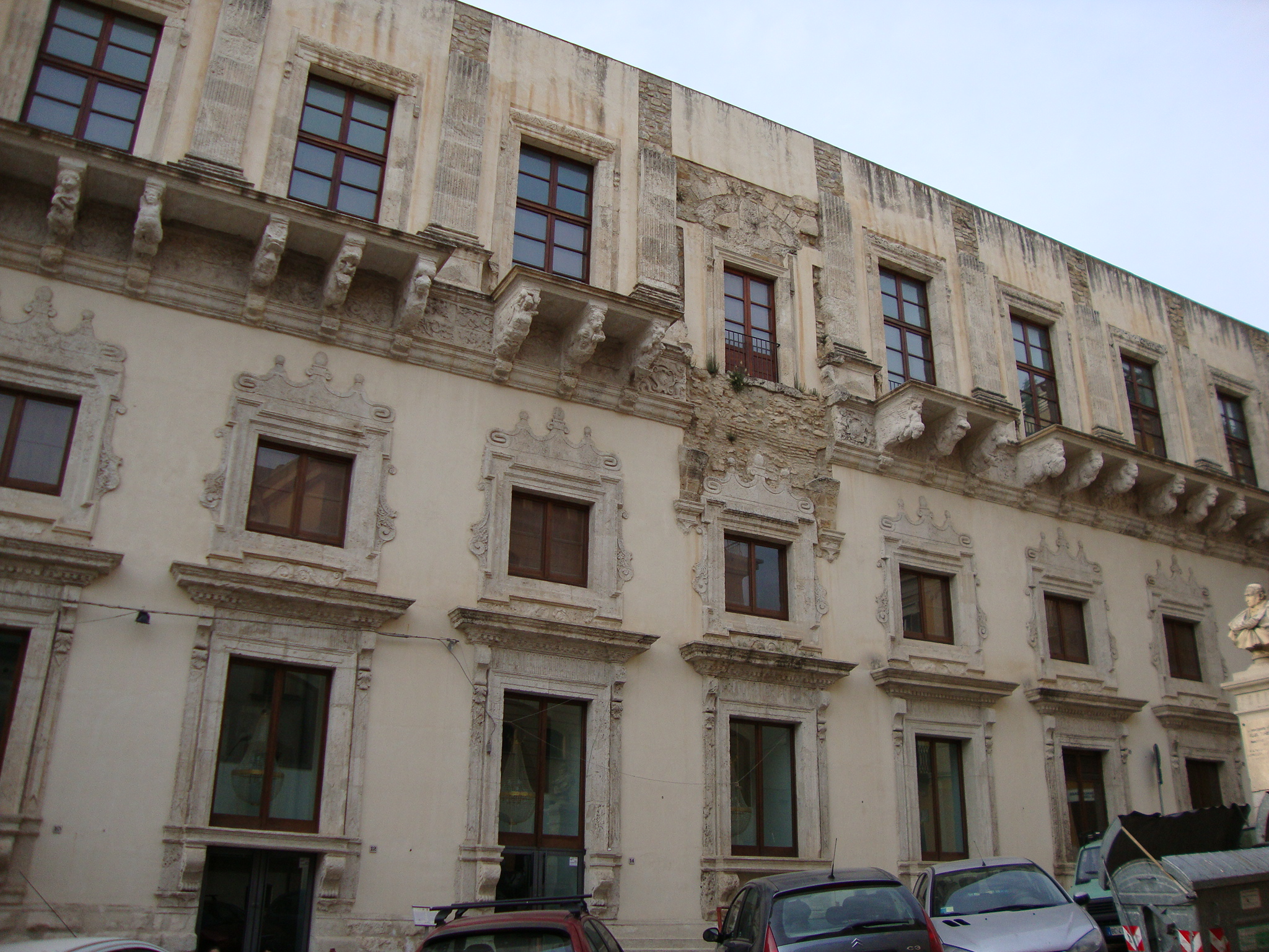 Facciata principale del palazzo storico. In primo piano sono visibili elementi e fregi barocchi zoomorfi e antropomorfi.